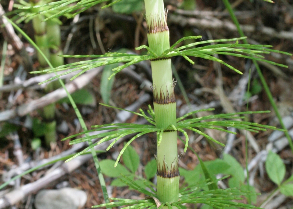 Equisetum_telmateia (Equiseto massimo) Località : Le Laste, Limana (BL), 661 m s.l.m.